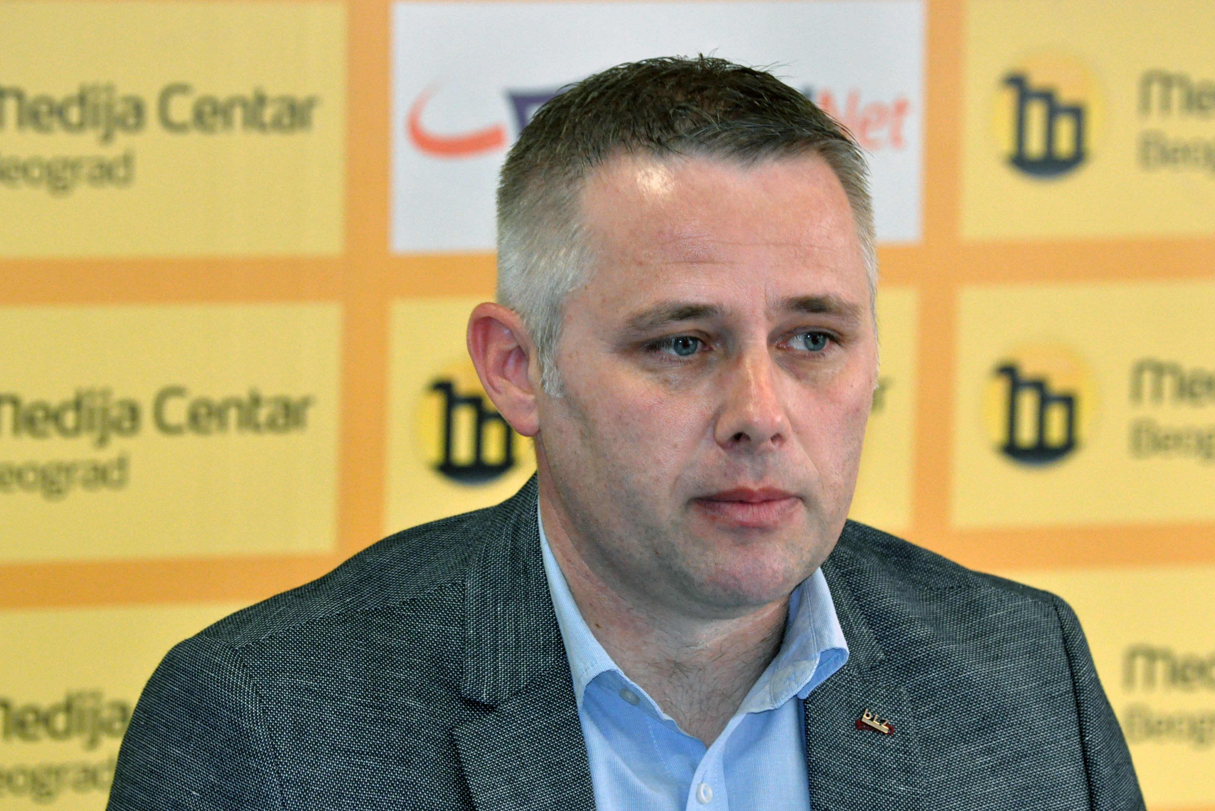 Игор Јурић српски хуманитарац